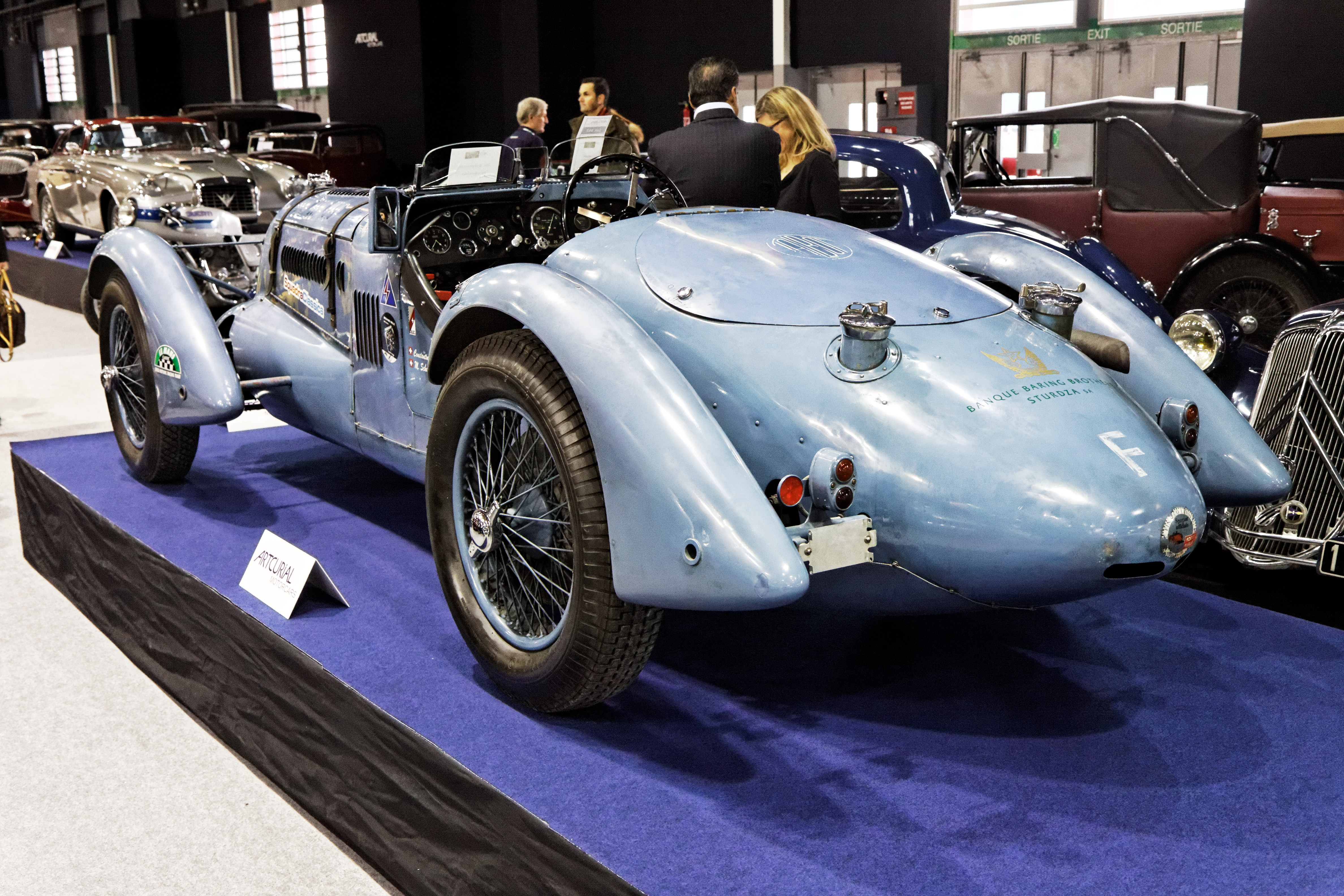 Une Talbot T150C présentée lors du salon Retromobile 2013.